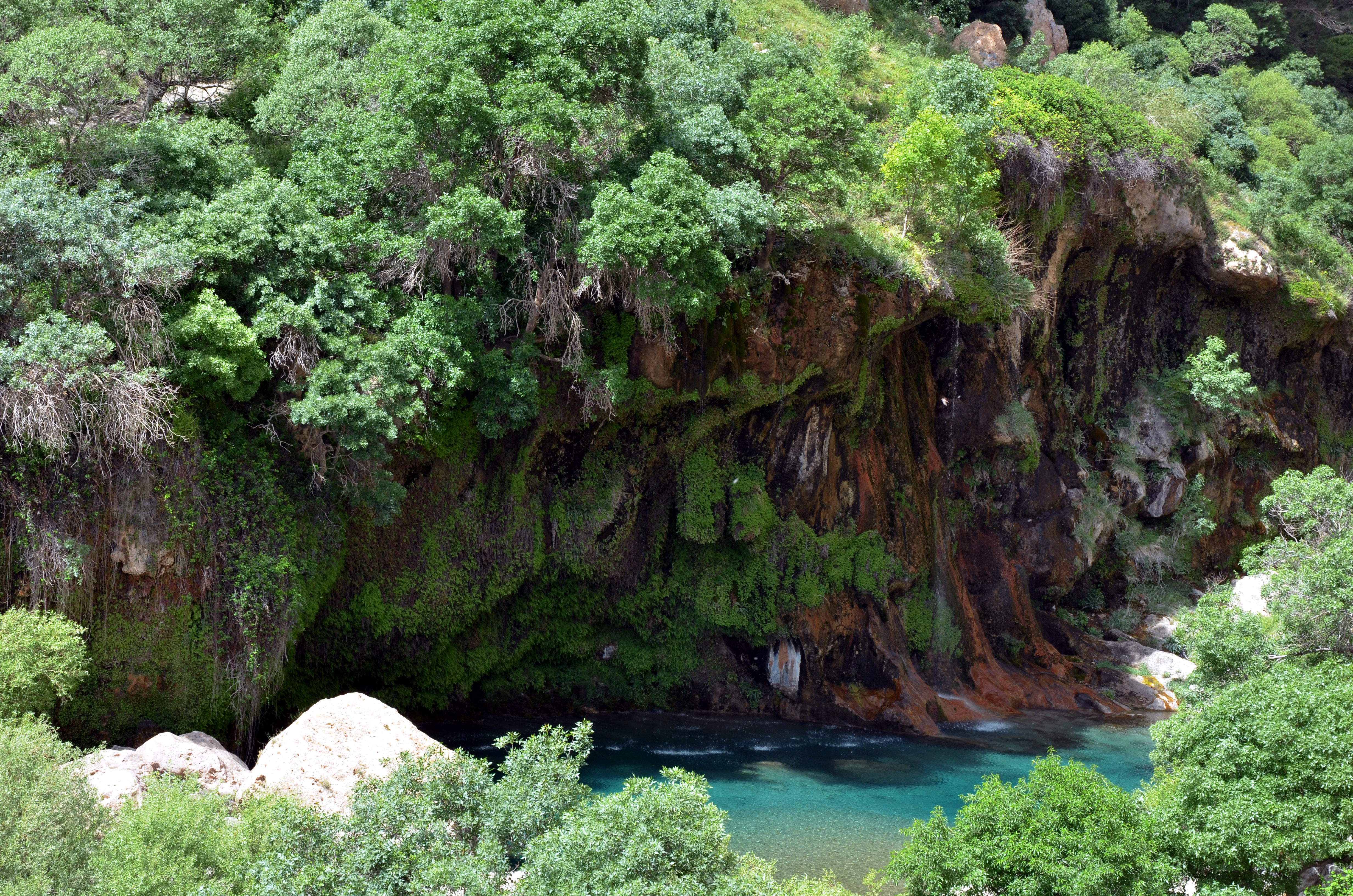 Fars - Sedeh - Tangeh Boragh